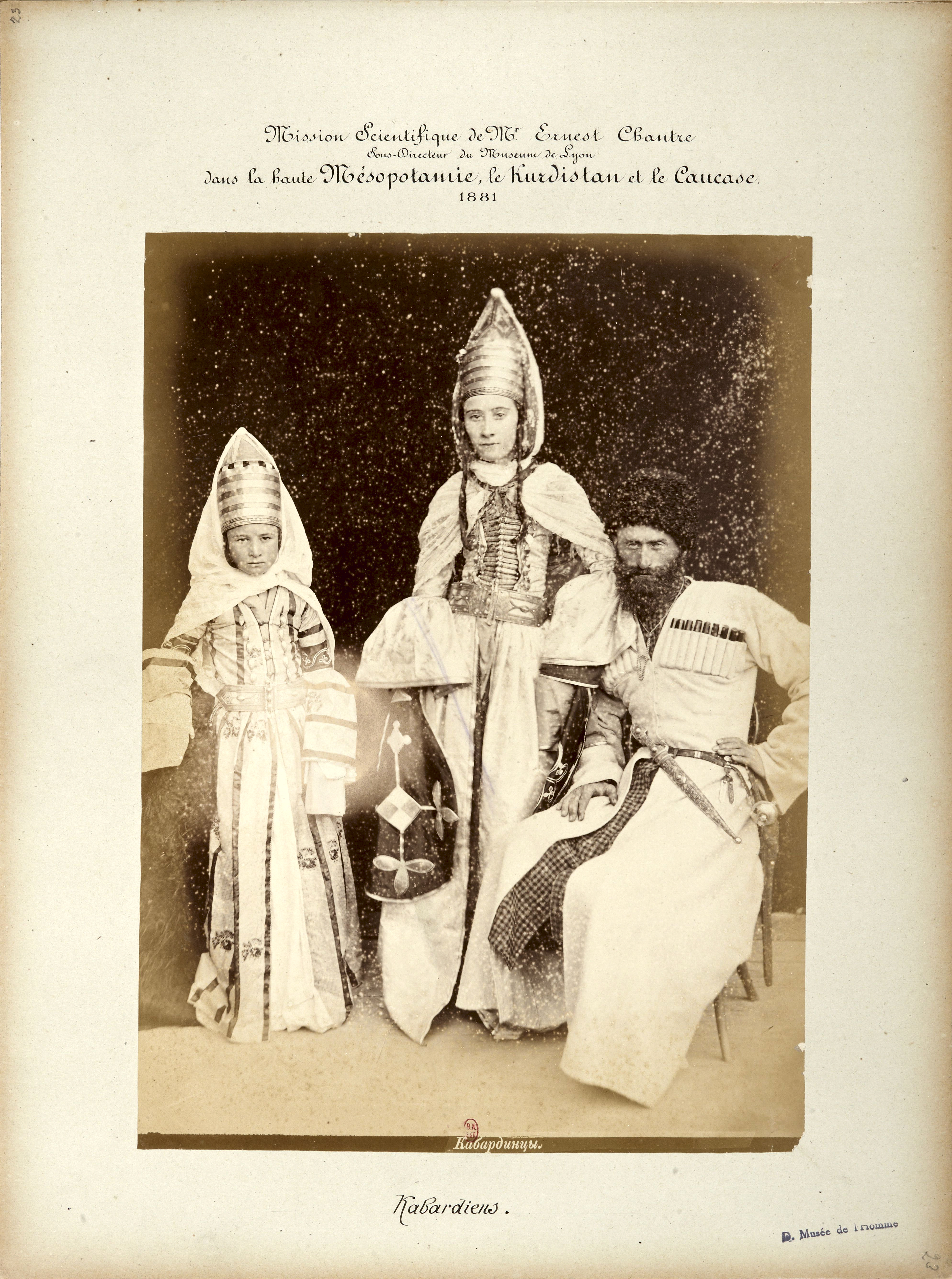 Barry (capitaine). F. 23. Kabardiens. Mission scientifique de Mr Ernest Chantre. 1881